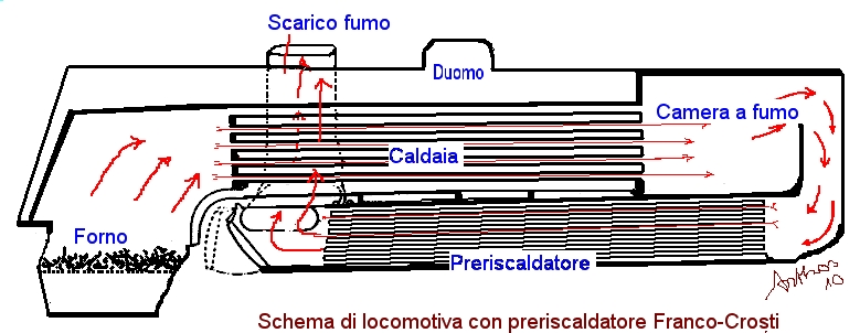 Disegno schematico di una locomotiva a preriscaldatore d'acqua Franco-Crosti